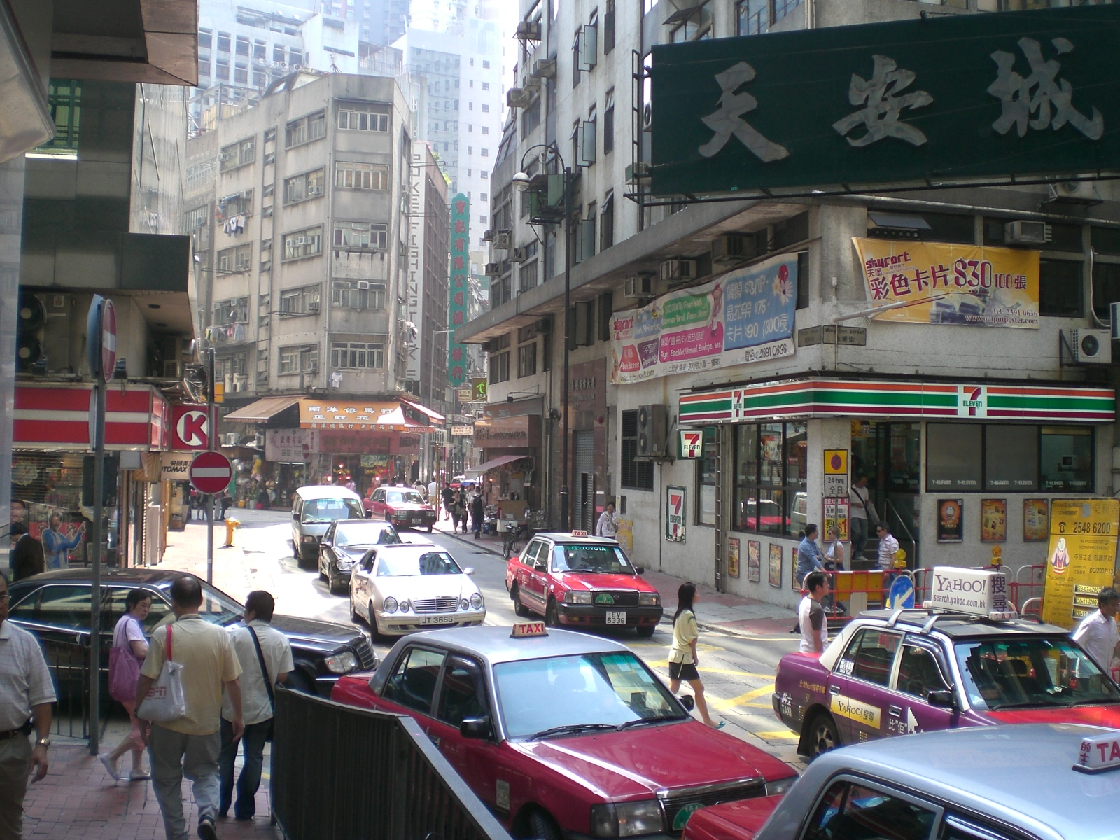 禧利街, 中西區, 上環, Hillier Street, Sheung Wan, Hong Kong